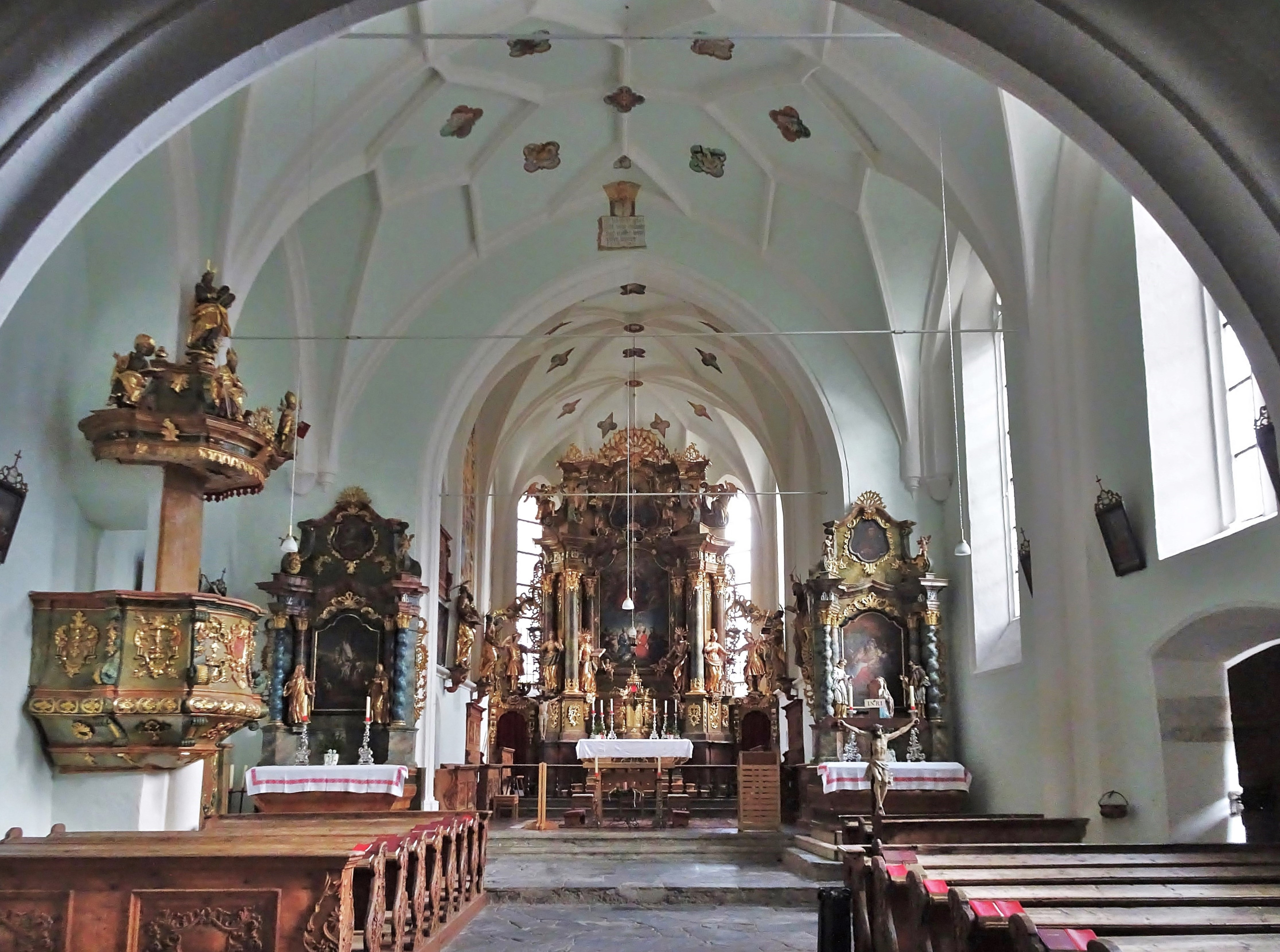 Kath. Filialkirche Hl. Maria (Maria Tax) Stallhofen (Obervellach), Innenansicht